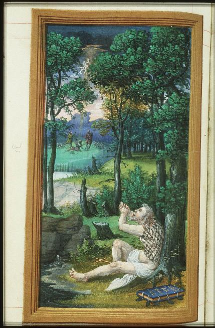 Livre d'heures KB, 74 G 38 - fol. 47v